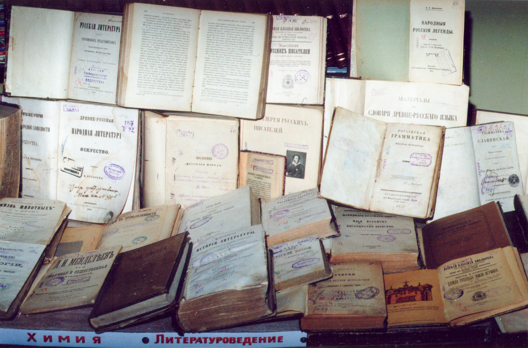 Книги из редкого фонда с которых в 1934 году начиналась Научная библиотека Курского государственного университета